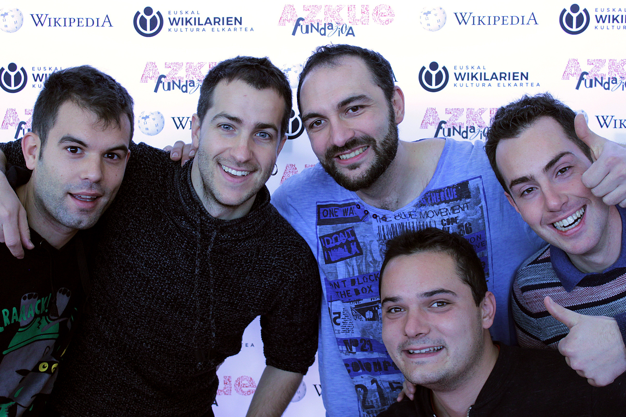 En Tol Sarmiento musika taldea Azkue Fundazioaren eta Euskal Wikilarien Kultura Elkartearen photocallean